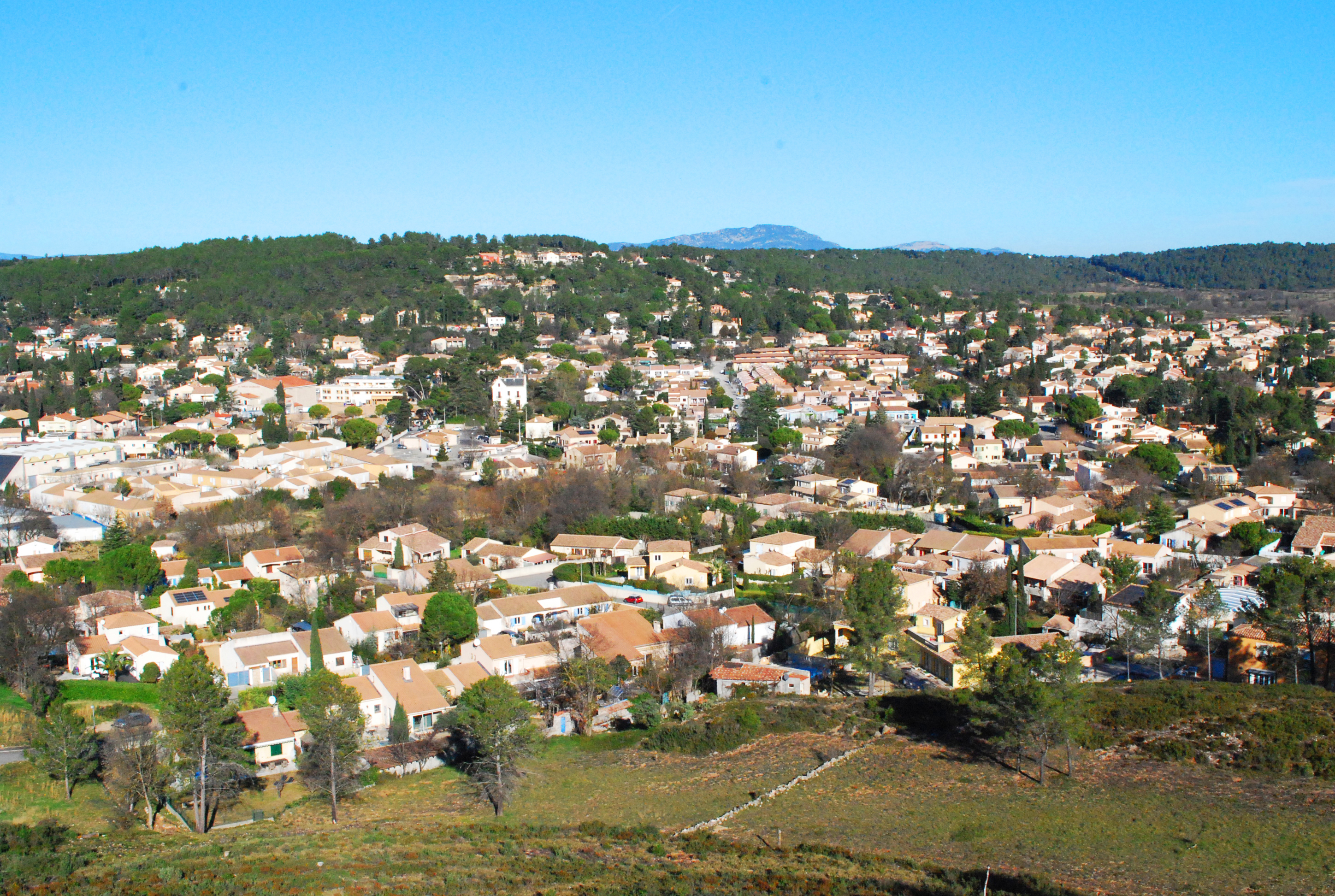 Ville de Grabels